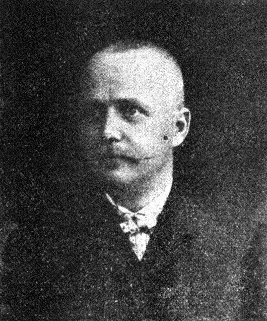 Österreichischer Politiker, Reichsratswahl 1907, Name siehe Dateiname